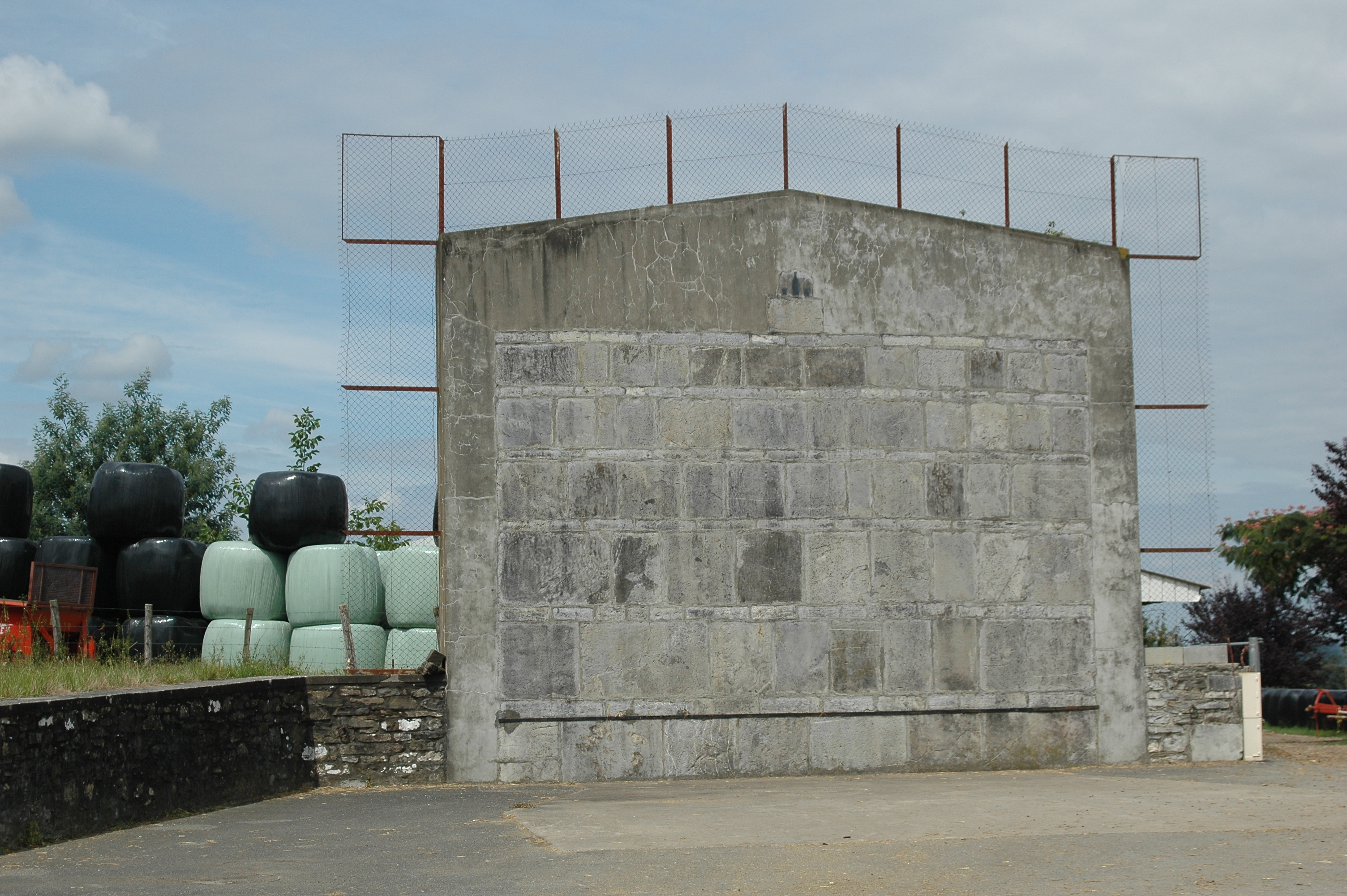 Le fronton d'Arhansus